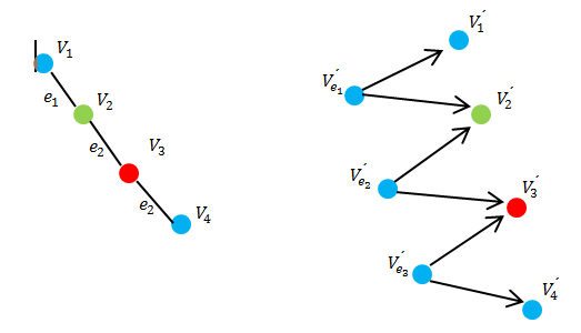 Primer paso de la contrucción